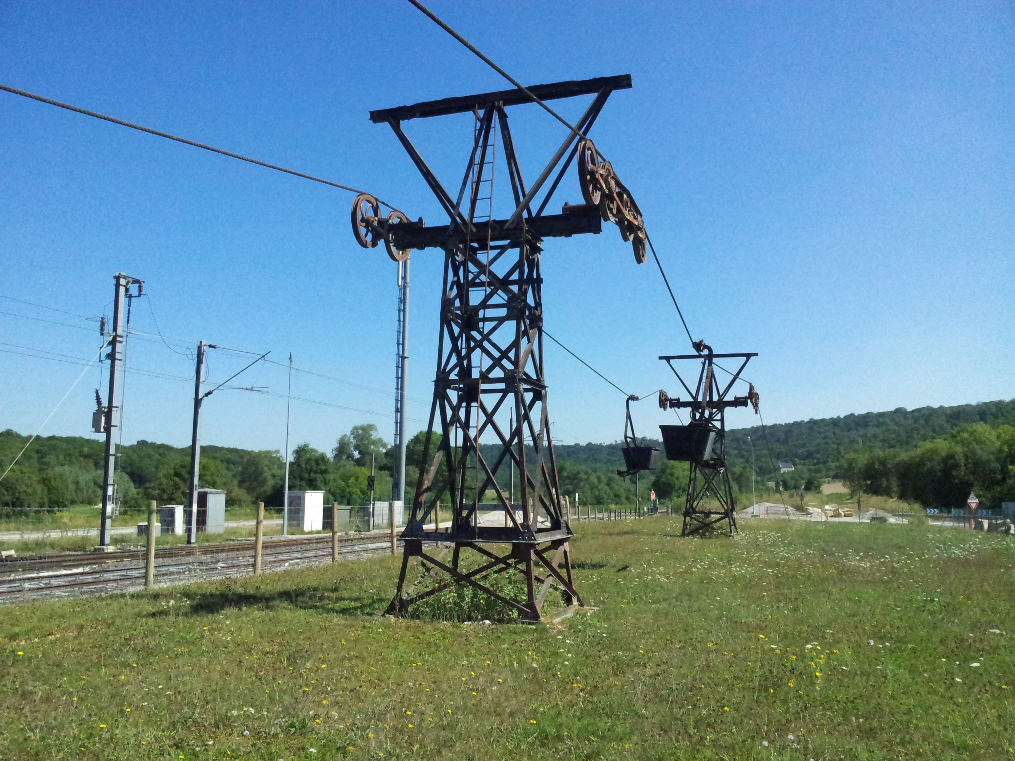 Vue d'ensemble d'une partie de l'ancien transporteur aérien Maxéville-Dombasle exposé à l'entrée de la carrière Solvay de Saint-Germain-sur-Meuse (deux pylônes et deux bennes).